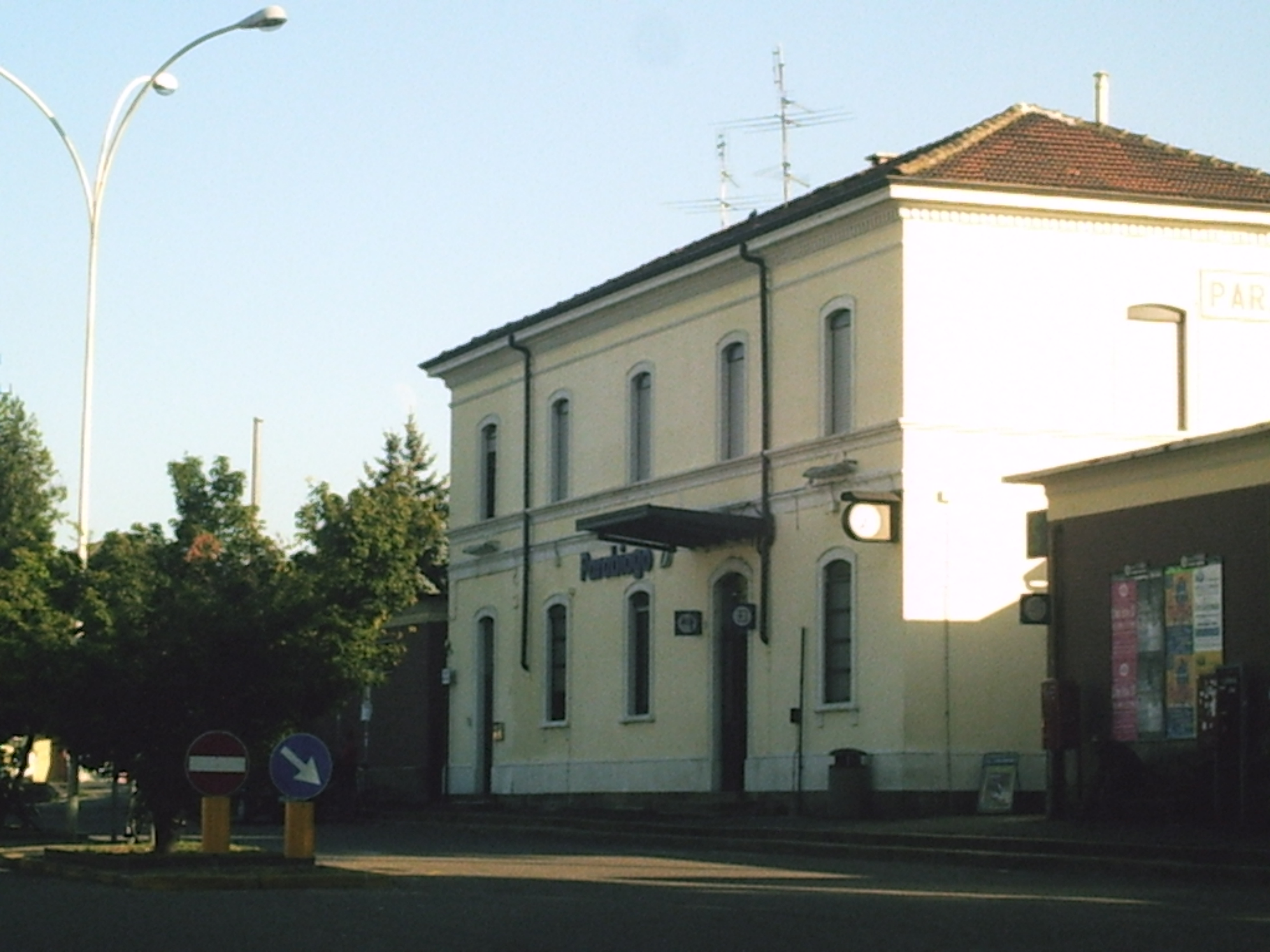 La stazione di Parabiago dal piazzale esterno